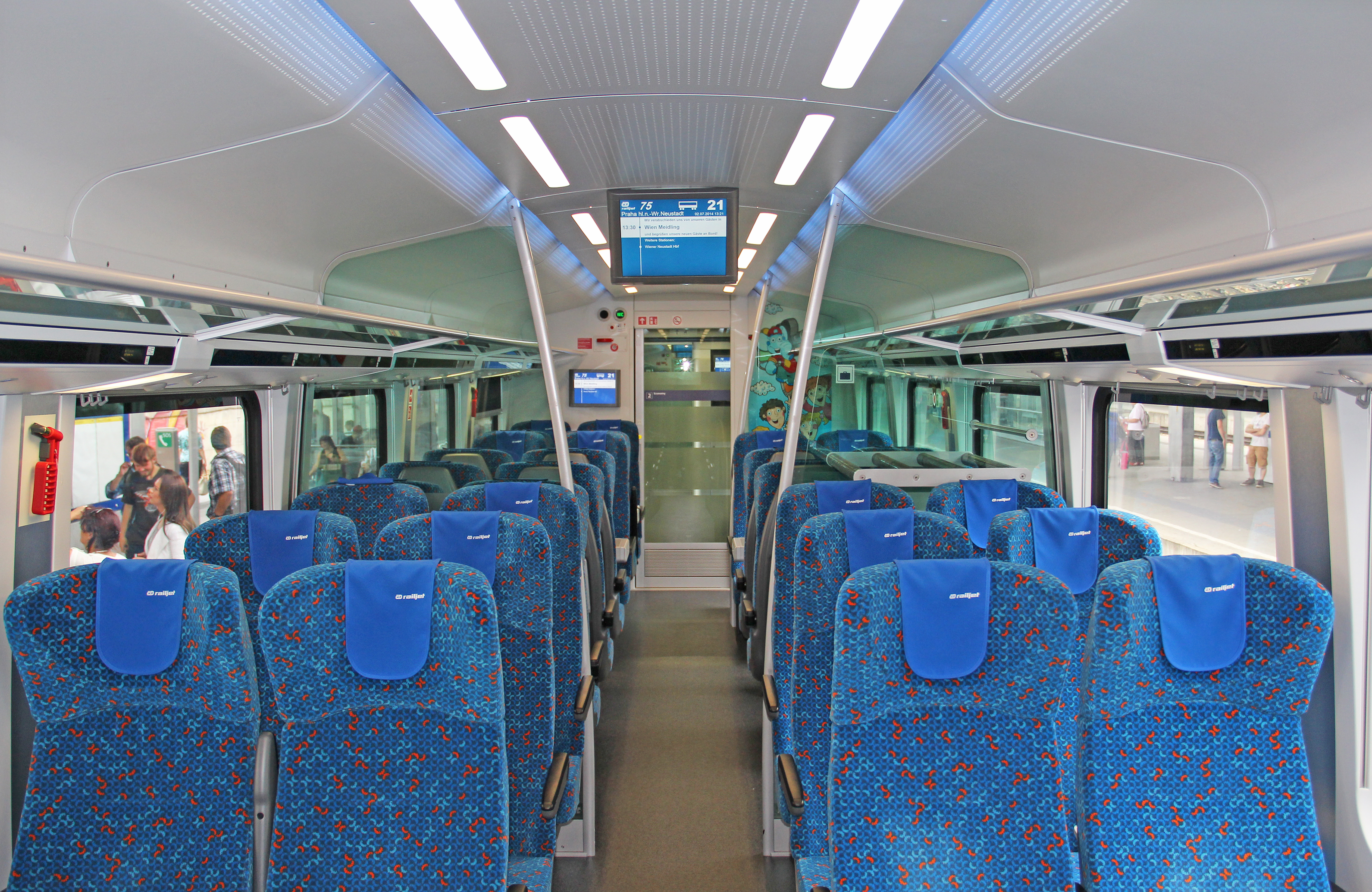 Innenraum eines Economy Class-Wagens des ČD-Railjets